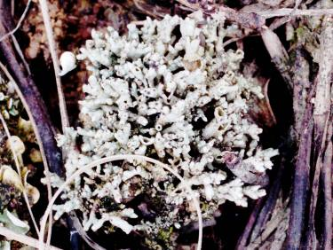 Pycnothelia papillaria